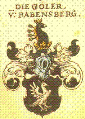 Wappen der Familie Göler von Ravensburg nach Siebmachers Wappenbuch